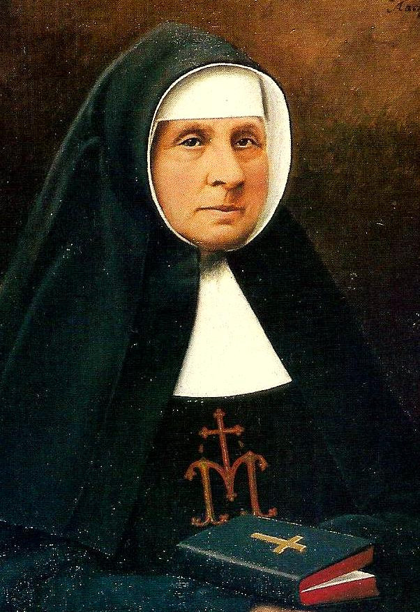 Scan eines Fotos von Josephine Koch, Schwester Mutter Elisabeth von Jesu, Generaloberin der Franziskanerinnen von der Heiligen Familie in Eupen